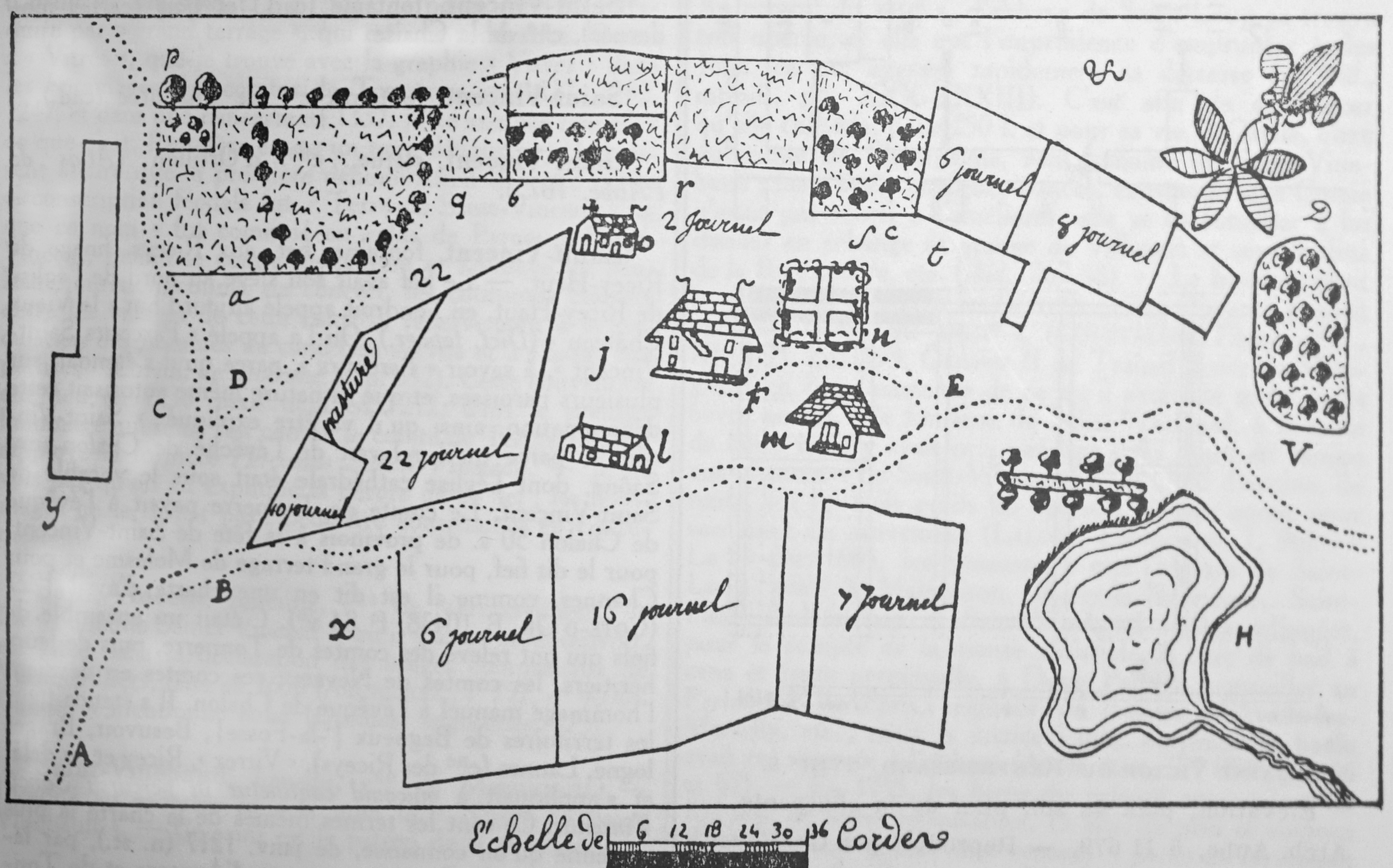 Une vue de la Chapelle st victor Renfroissart par Ch Favet. cote 6 H 679.